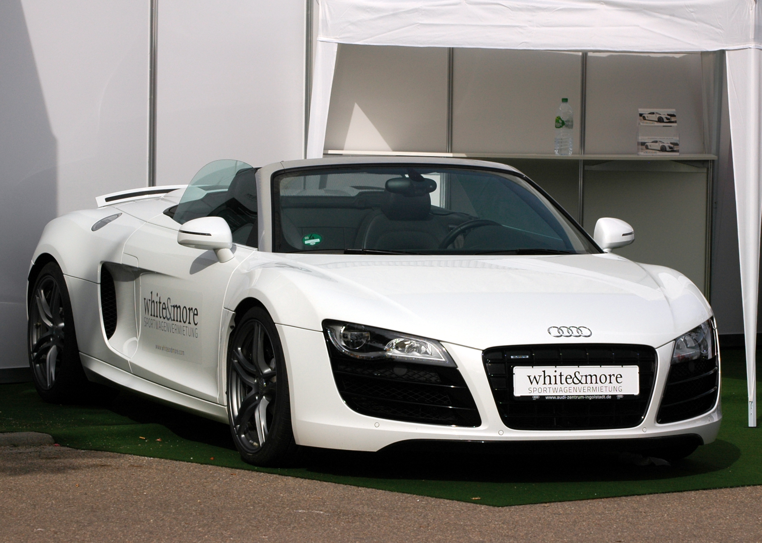 Maimarkt Mannheim 2015: Audi R8 5,2 FSI V10 Spyder white&more